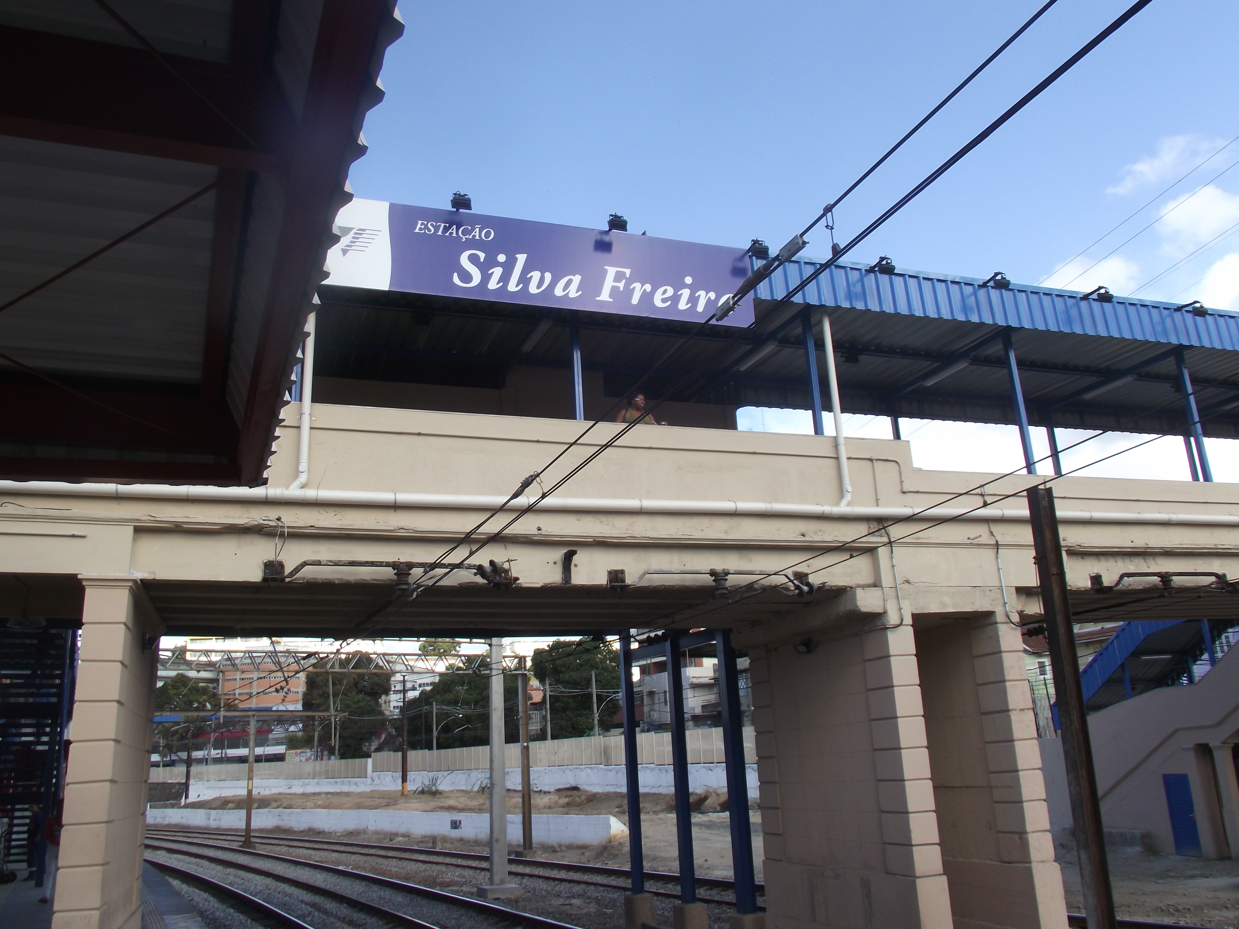 Vista da estação ferroviária Silva Freire, no Rio de Janeiro.